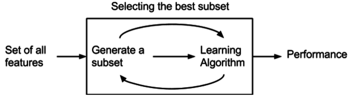 Wrapper Method pour la selection d'attribut